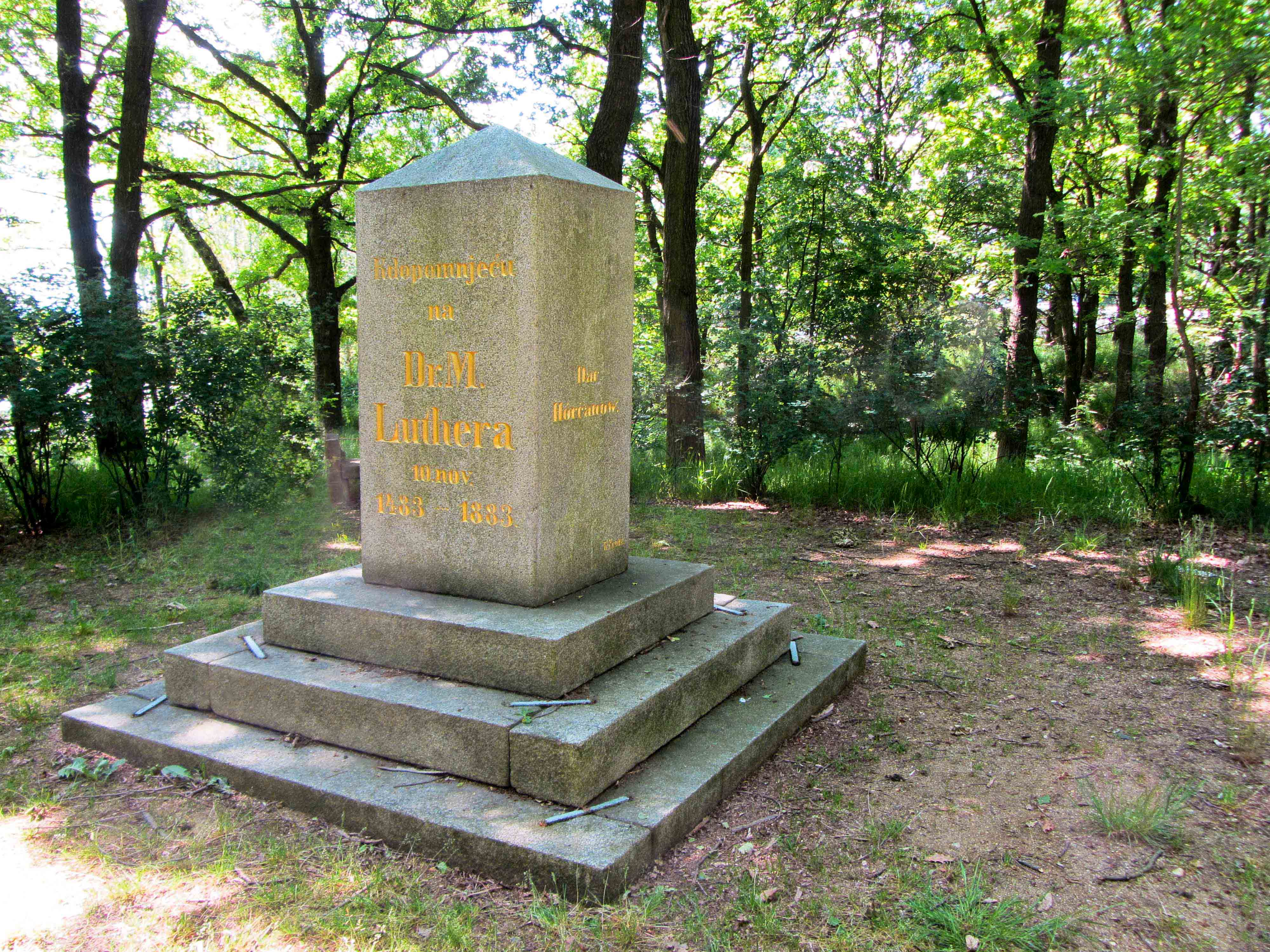 Lutherdenkmal in Niedergurig. Einziges Lutherdenkmal in sorbischer Sprache Hornjoserbsce: Jenički serbskorěčny Lutherowy pomnik na Křiču blisko Delnjeje Hórki